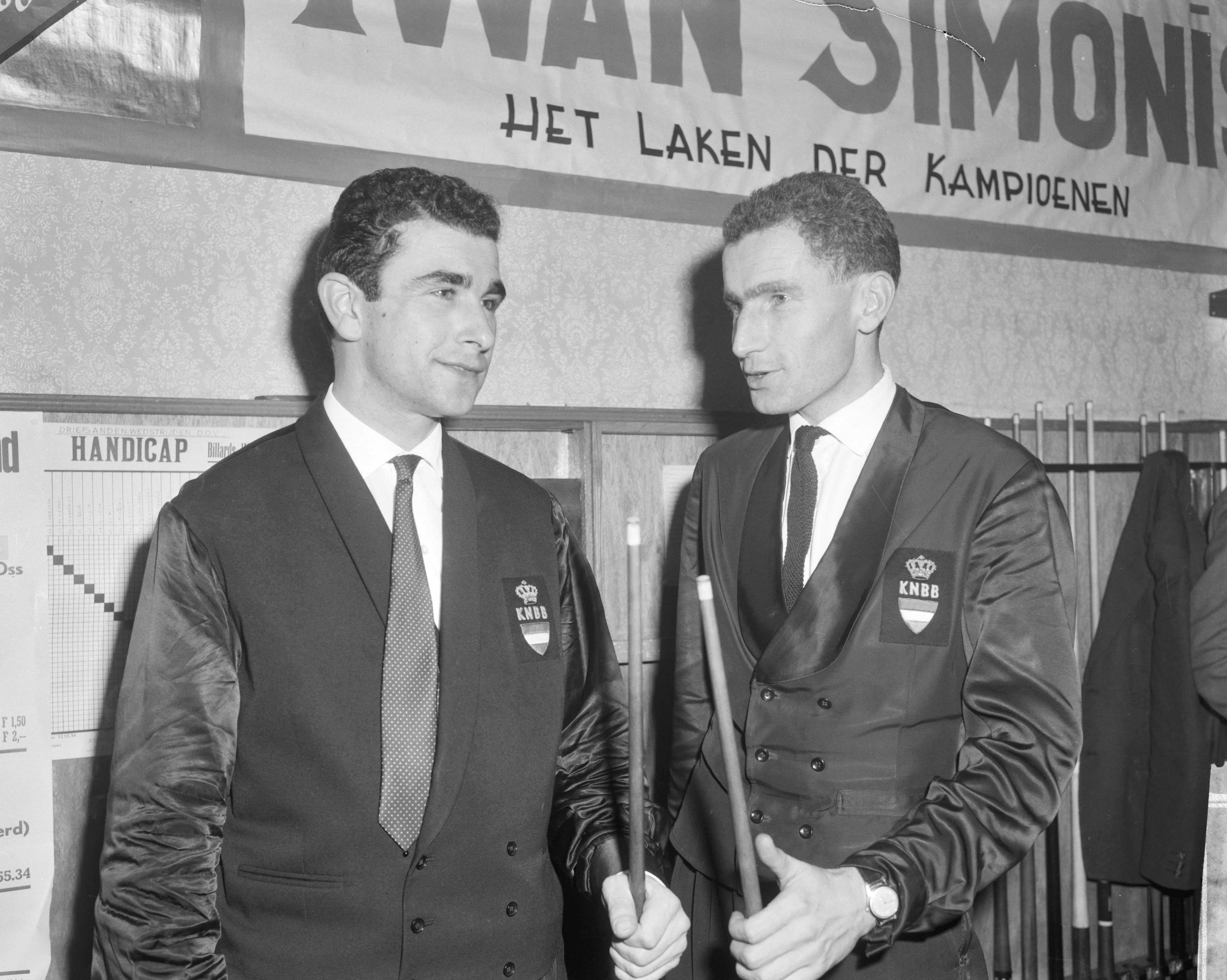 Collectie / Archief : Fotocollectie Anefo Reportage / Serie : [ onbekend ] Beschrijving : Twee finalisten te Oss, Henk Scholte (links) en Tini Wijnen (rechts) Datum : 15 december 1962 Locatie : Oss Trefwoorden : biljarten, sport Persoonsnaam : Scholte Henk, Wijnen Tini Fotograaf : Koch, Eric / Anefo Auteursrechthebbende : Nationaal Archief Materiaalsoort : Negatief (zwart/wit) Nummer archiefinventaris : bekijk toegang 2.24.01.04 Bestanddeelnummer : 914-6155 Reacties Geplaatst door diny op 05 juni 2009 - 18:05. komt Tini Wijnen uit Bergen op Zoom, volgens mij heb ik hem ontmoet tijdens een vacantie in mijn jeugd, ongeveer 1953 graag reactie,,, Geplaatst door Maaike op 13 oktober 2012 - 15:40. Tini Wijnen komt uit Oss